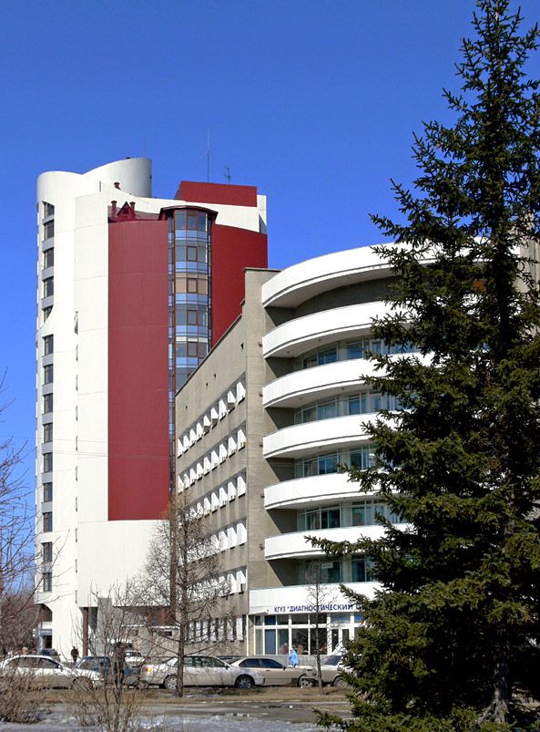 Budova diagnostického centra v Barnaulu, Rusko